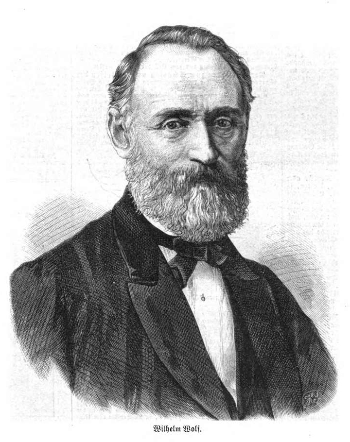 Friedrich Wilhelm Wolff, deutscher Bildhauer im 19. Jh.